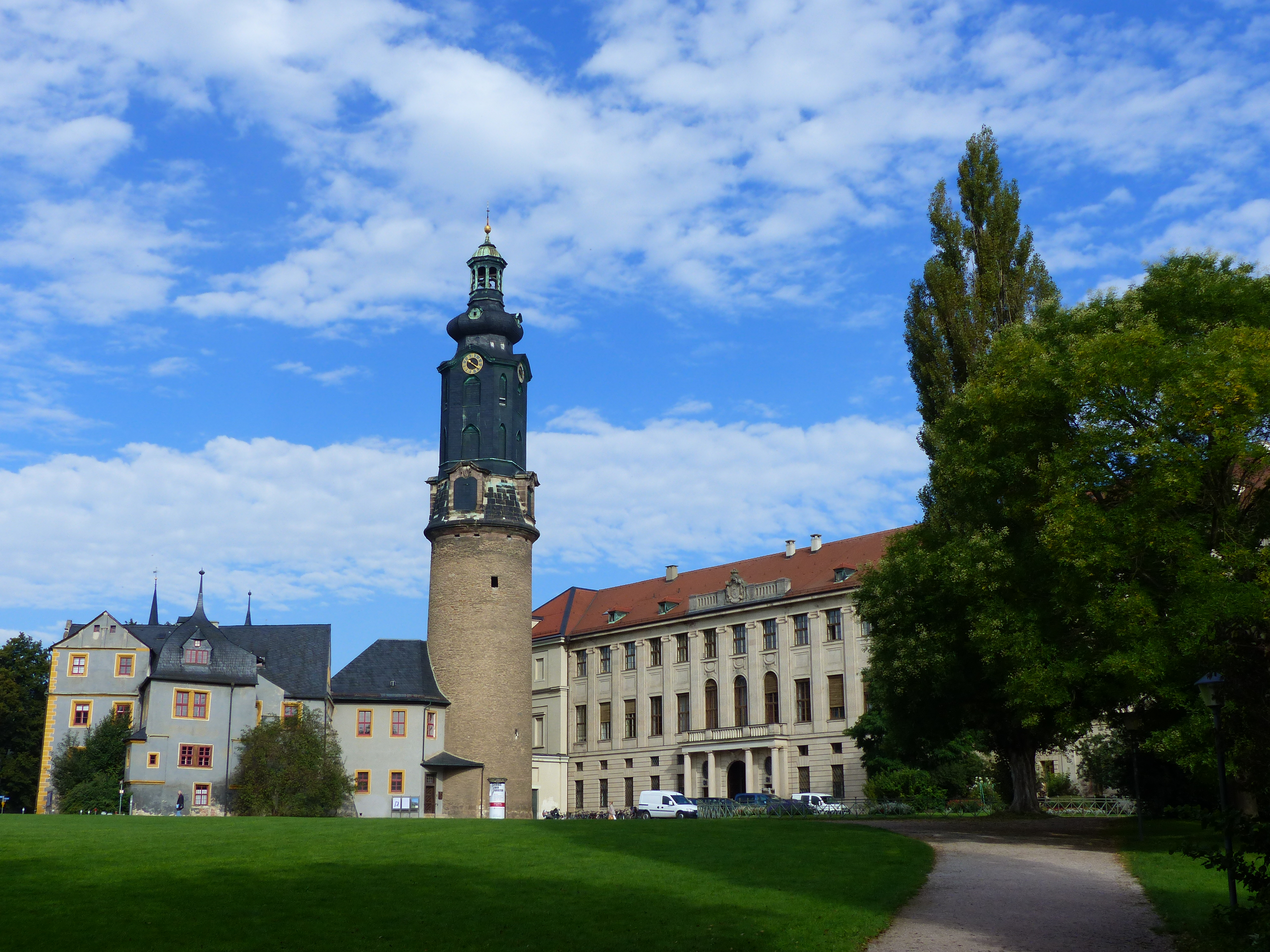 Residenzschloss Weimar